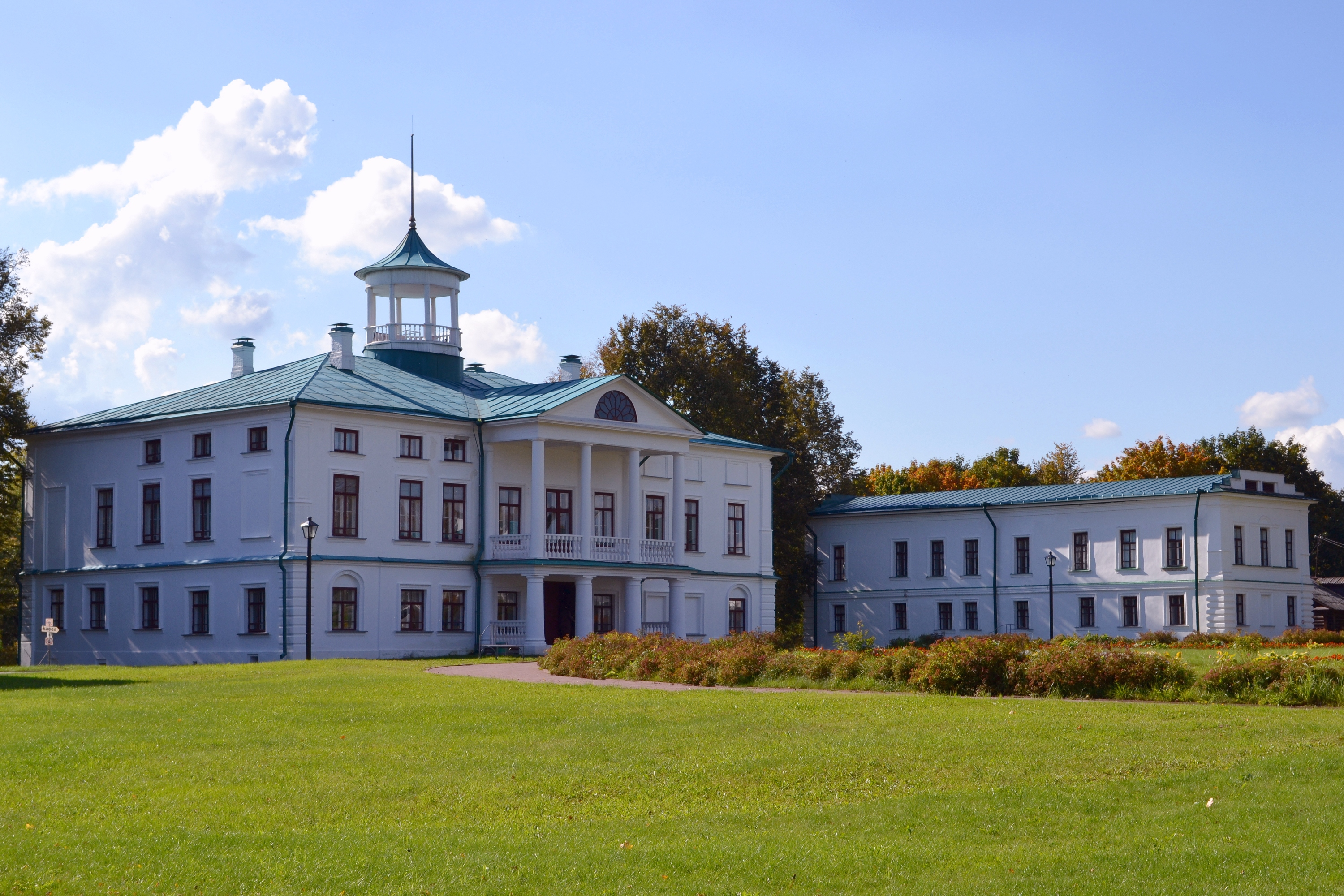 Государственный литературно-мемориальный музей-заповедник Некрасова Н.А., усадьба Карабиха: Карабиха, Ярославский район, Ярославская область